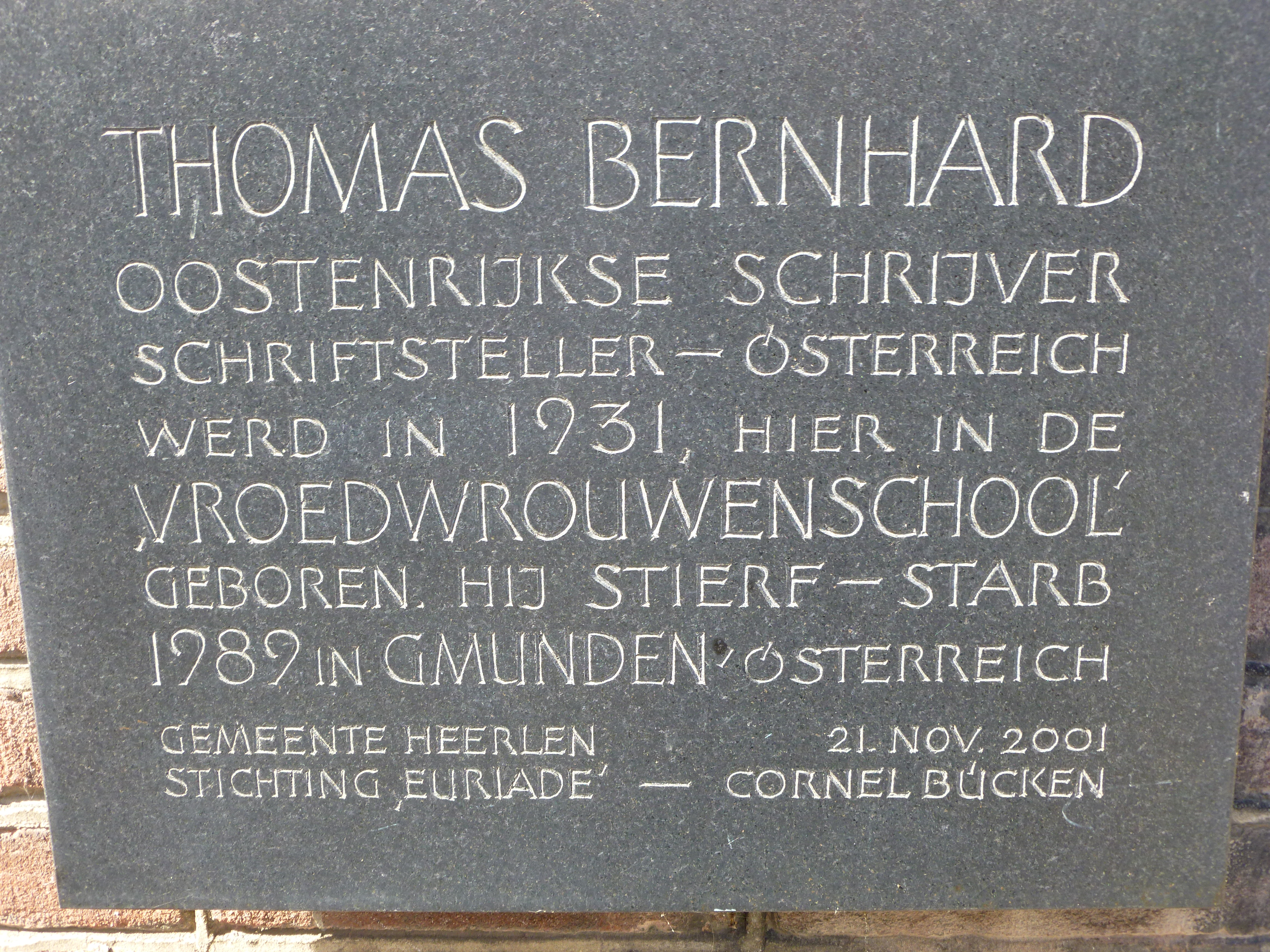 De plaquette aan de voorm. Vroedvrouwenschool Heerlen